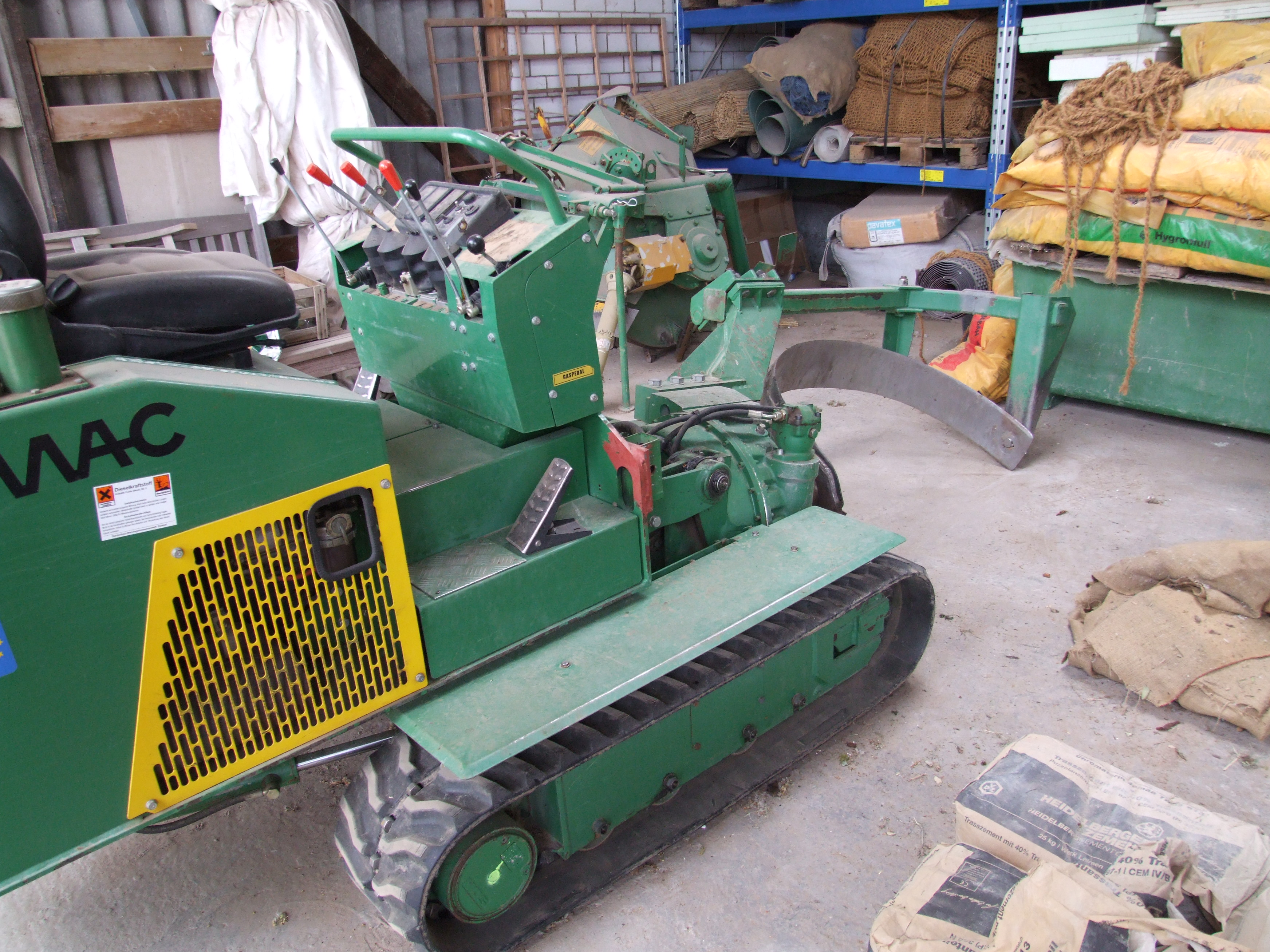 Selbstfahrender Holmac-Ballenschneider für das Herausschneiden von Wurzelballen in Baumschulen und Gartenbaubetrieben. Mit dem Ballenschneider wird der Baum oder der Strauch ausgegraben, um ihn zu versetzen (verschulen) oder zu ernten.